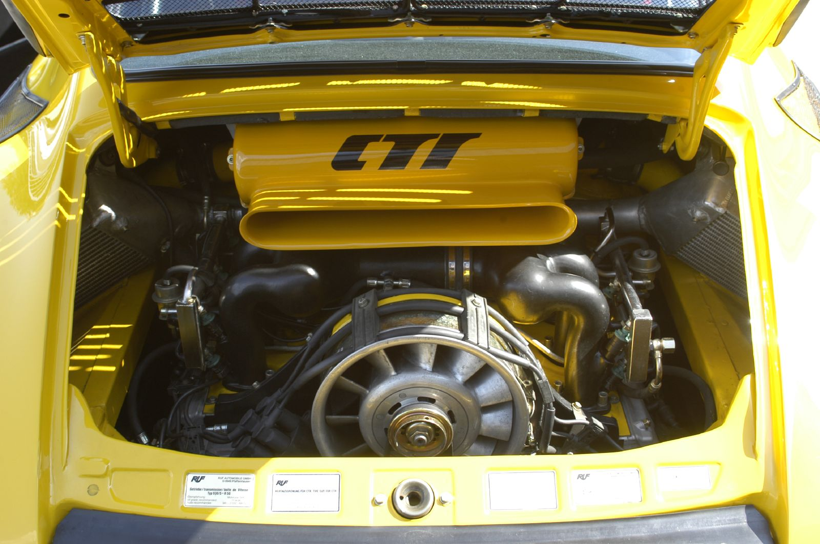 Ruf CTR Yellowbird engine